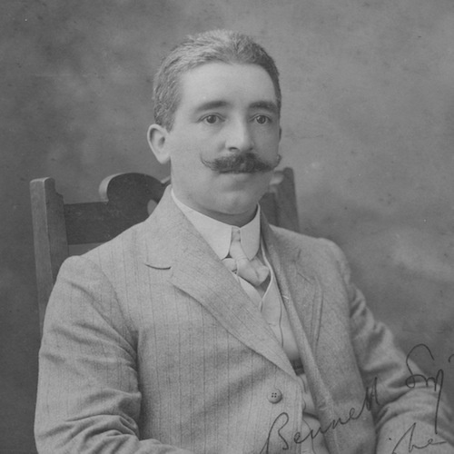 Le compositeur Havergal Brian (1876–1972) vers 1900.